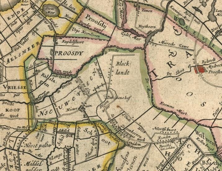 Nieuwveen, Bloklandt, Rijnland amstelland atlasmaior